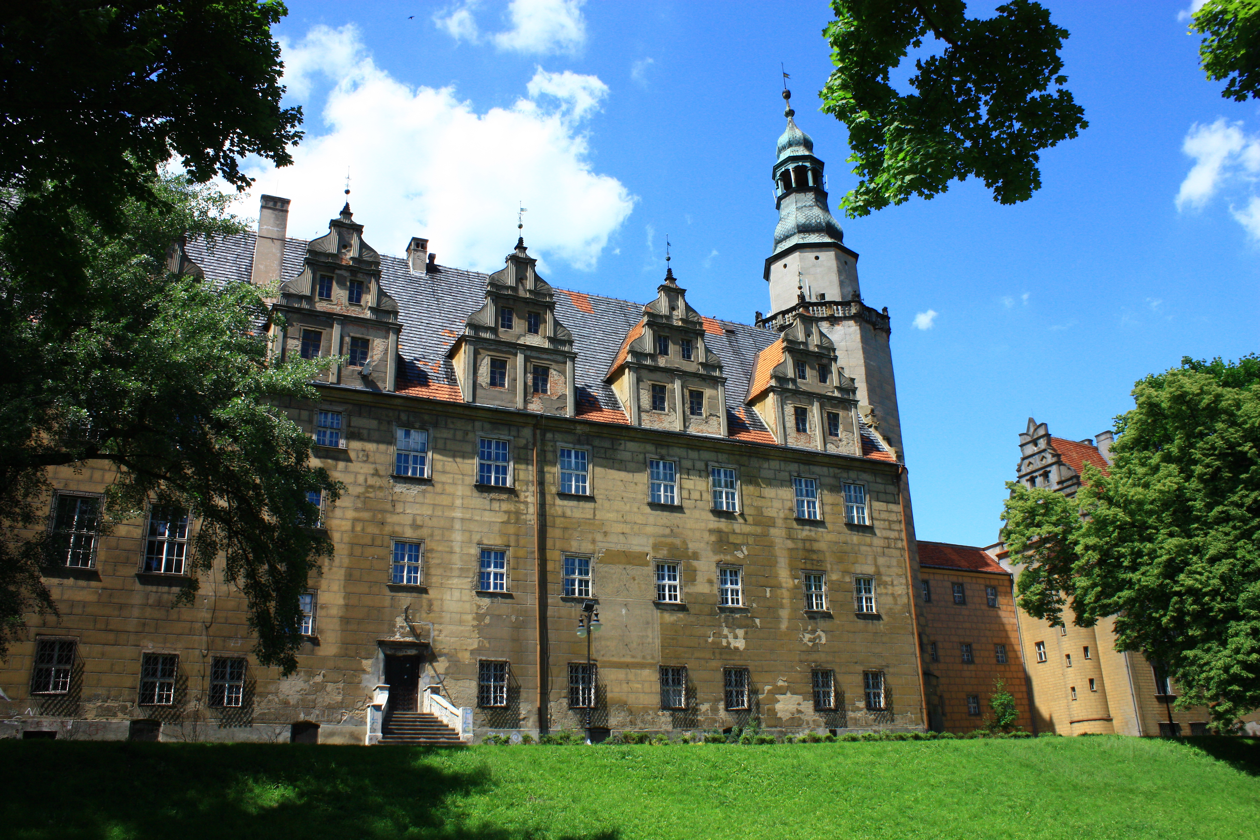 Oleśnica, zamek, XIII, 1585-1600, XVIII